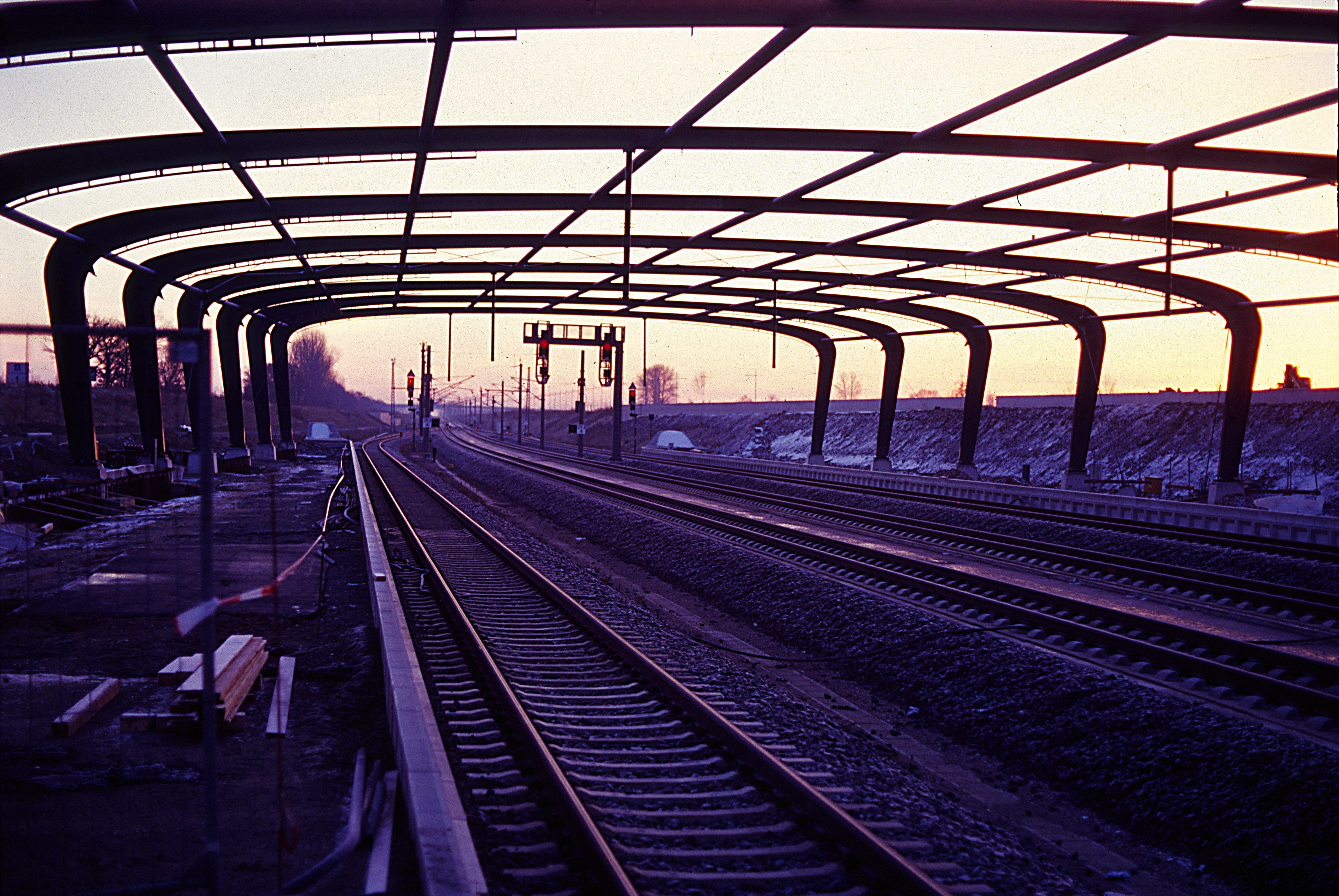 Kurz nach der Teilinbetriebnahme des Streckenabschnittes Leipzig-Mockau–Leipzig/Halle Flughafen, nur das Bahnsteiggleis 4 auf der Nordseite ist benutzbar, der Bahnsteig ist nur auf der unbedingt nötigen Länge fertiggestellt, das Dach fehlt und die Fahrleitung endet auf Höhe der Schutzweichen 20 und 21. Die unmittelbare Folge ist, dass sie nicht genutzt werden kann, doch im Regionalbereich Südost von DB Regio (wo man es eigentlich besser wissen müsste) ist der Dieselbetrieb das Maß der Dinge.Immerhin ist das Stellwerk soweit in Betrieb, dass zwischen Mockau und Flughafen beide Streckengleise genutzt werden können.